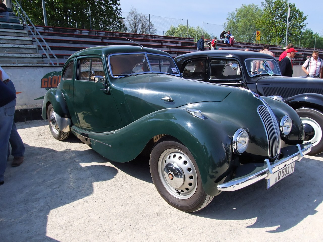 Quelle: selbst fotografiert, 04/2007 Fotograf: Späth Chr.